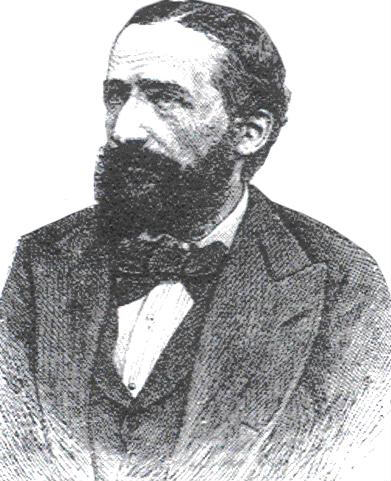 Johannes Hermann Zukertort in den 1880er Jahren (von der niederländischen Wikipedia) Afbeelding:Sukkeljk.jpg